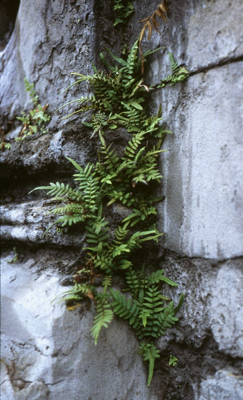 Gebänderter Saumfarn (Pteris vittata), Saumfarngewächse (Pteridaceae) - Argentinien/Argentina, Buenos Aires, San Telmo, Paseo Colón